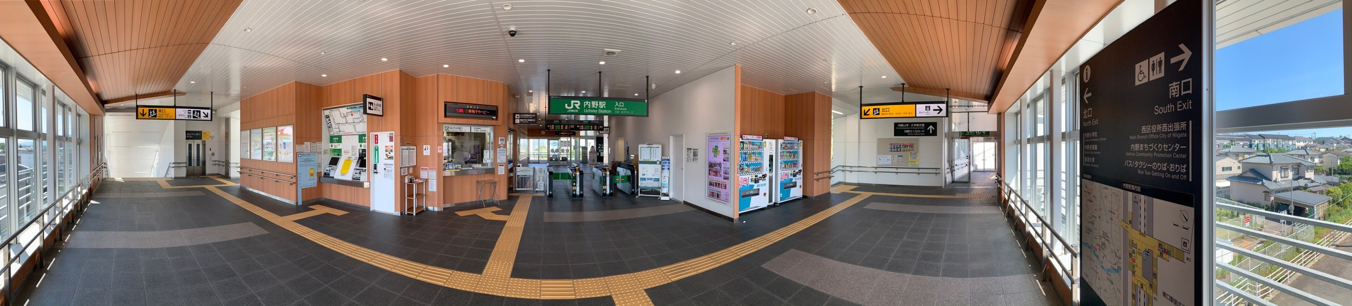 内野駅の橋上駅舎内、改札口周辺（2020年6月）パノラマ撮影。